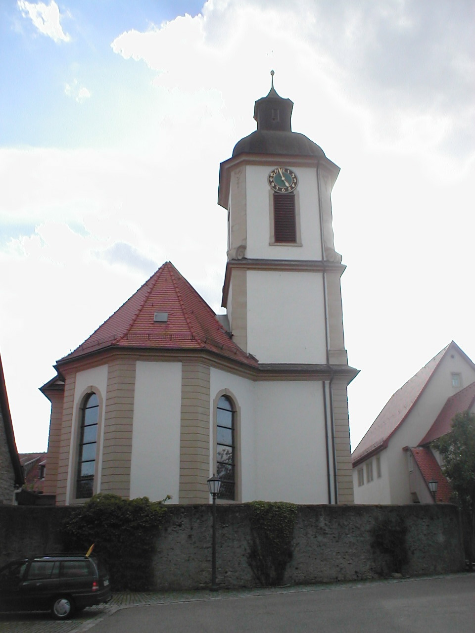 Katholische Kirche St. Kilian in Duttenberg, erbaut 1733-34 durch den Neckarsulmer Baumeister Georg Philipp Wenger